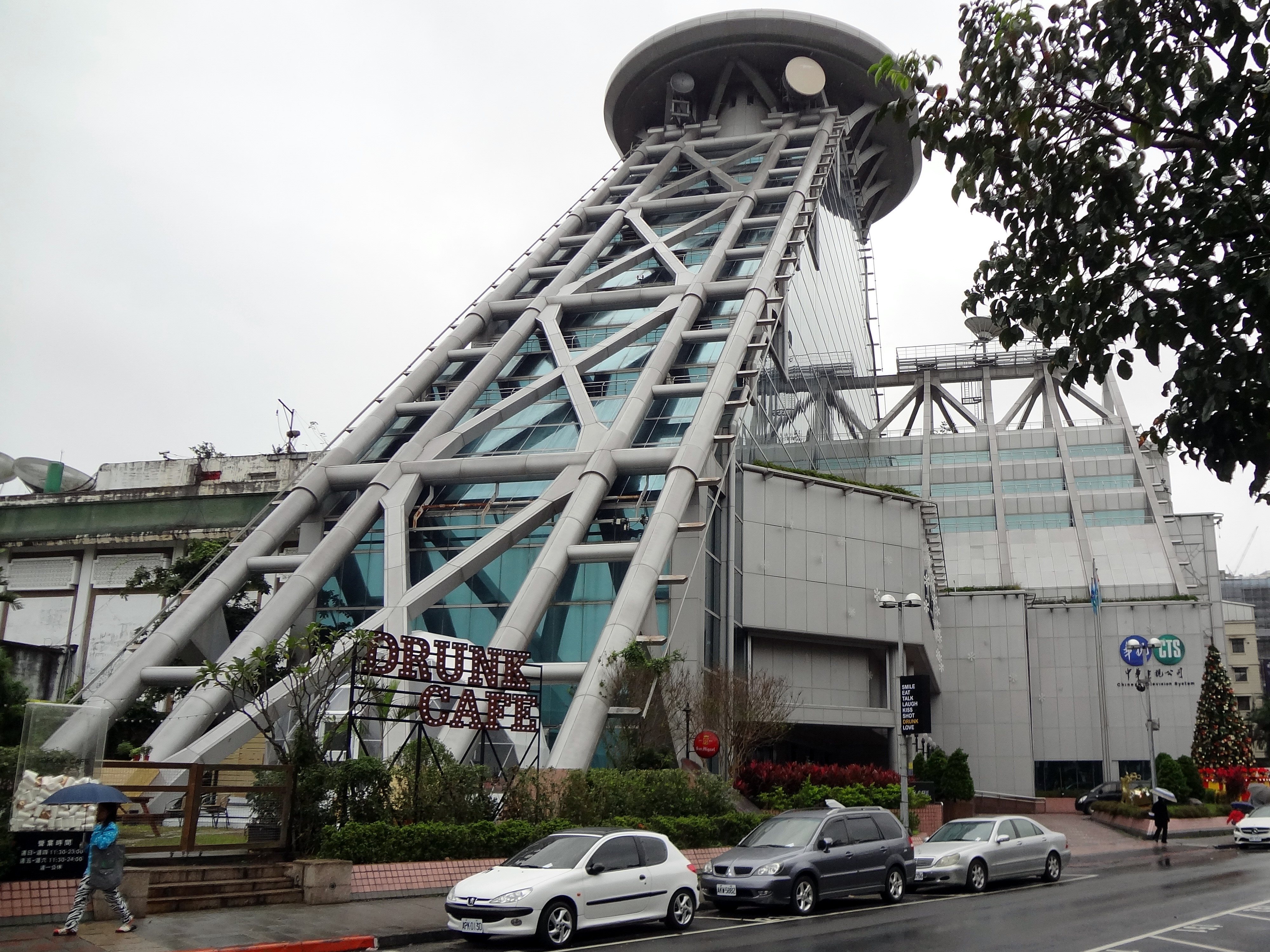 中華電視公司電視製作大樓。